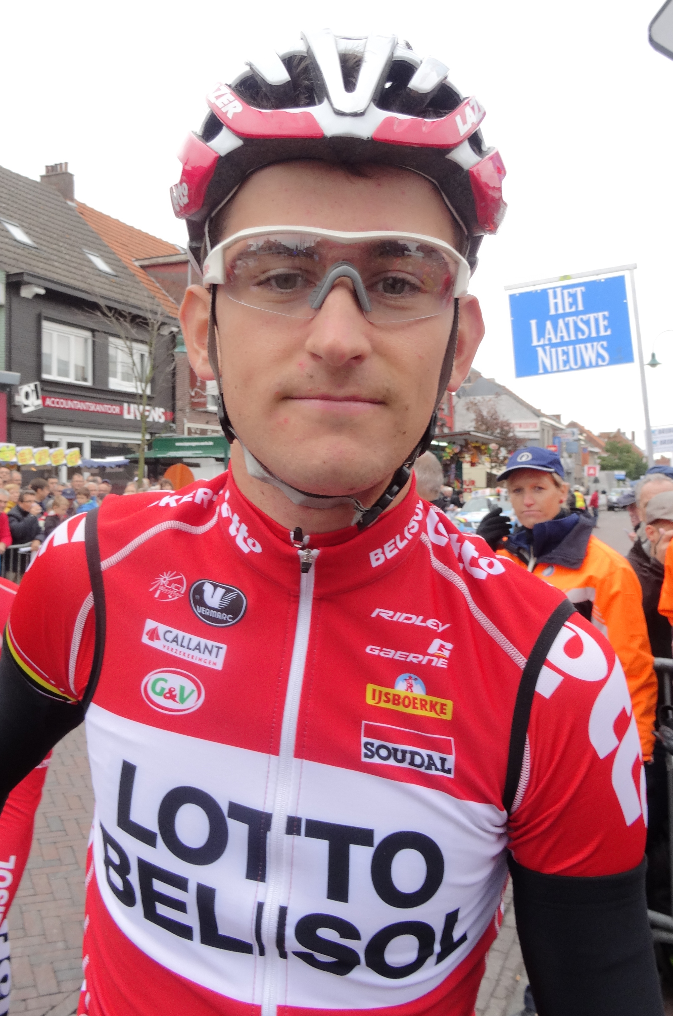 Reportage photographique réalisé le mardi 14 octobre à l'occasion du départ et de l'arrivée du Prix national de clôture 2014 à Putte (Woensdrecht, Pays-Bas) et Putte-Kapellen (Kapellen, Belgique).